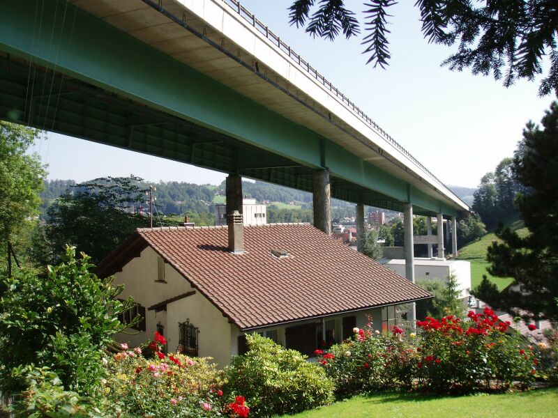 Autobahnbrücke der A12 über Wohn- und Gewerbequartiere von Flamatt, Schweiz